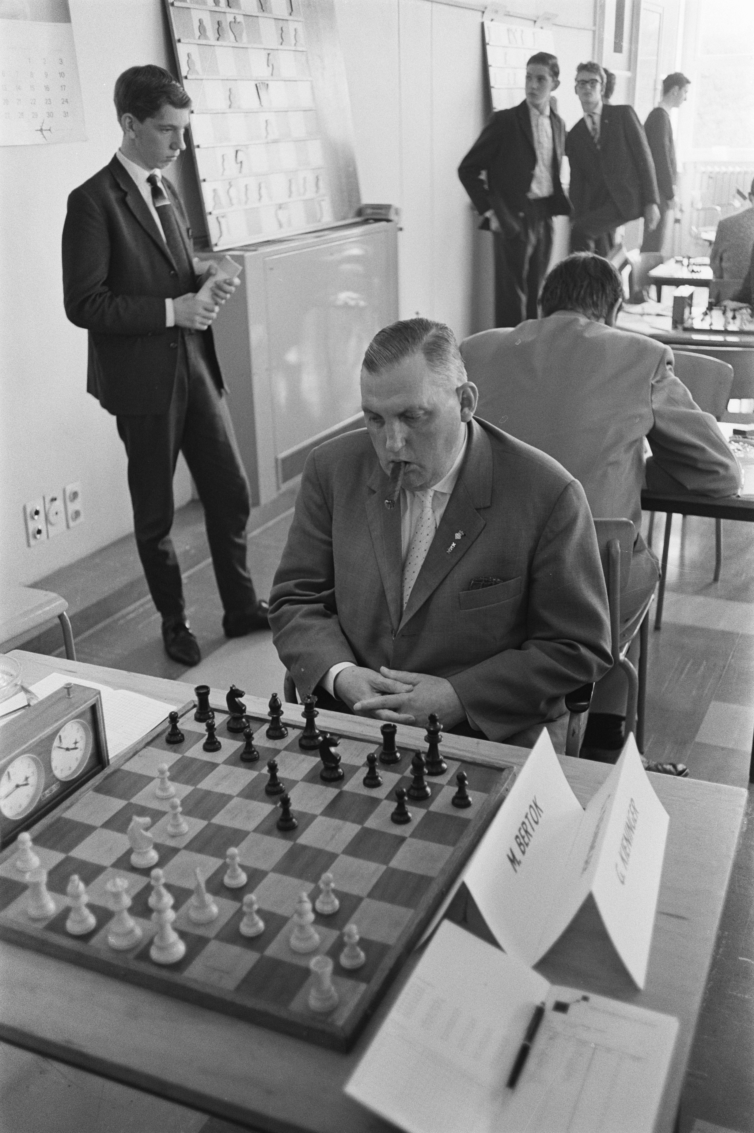 Collectie / Archief : Fotocollectie Anefo Reportage / Serie : [ onbekend ] Beschrijving : Derde IBM Meestertoernooi .(fotonr. 15) Match Mario Bertok vs. Georg Kieninger. Datum : 29 augustus 1963 Locatie : Amsterdam, Noord-Holland Trefwoorden : schaken, sport Persoonsnaam : G. Kieminger, Hartog Fotograaf : Walta, Winfried / Anefo Auteursrechthebbende : Nationaal Archief Materiaalsoort : Negatief (zwart/wit) Nummer archiefinventaris : bekijk toegang 2.24.01.05 Bestanddeelnummer : 915-4870